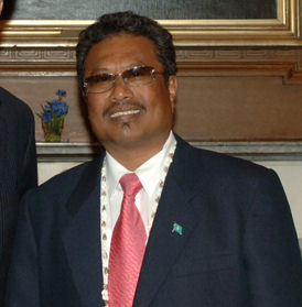 Palau President Tommy Remengesau